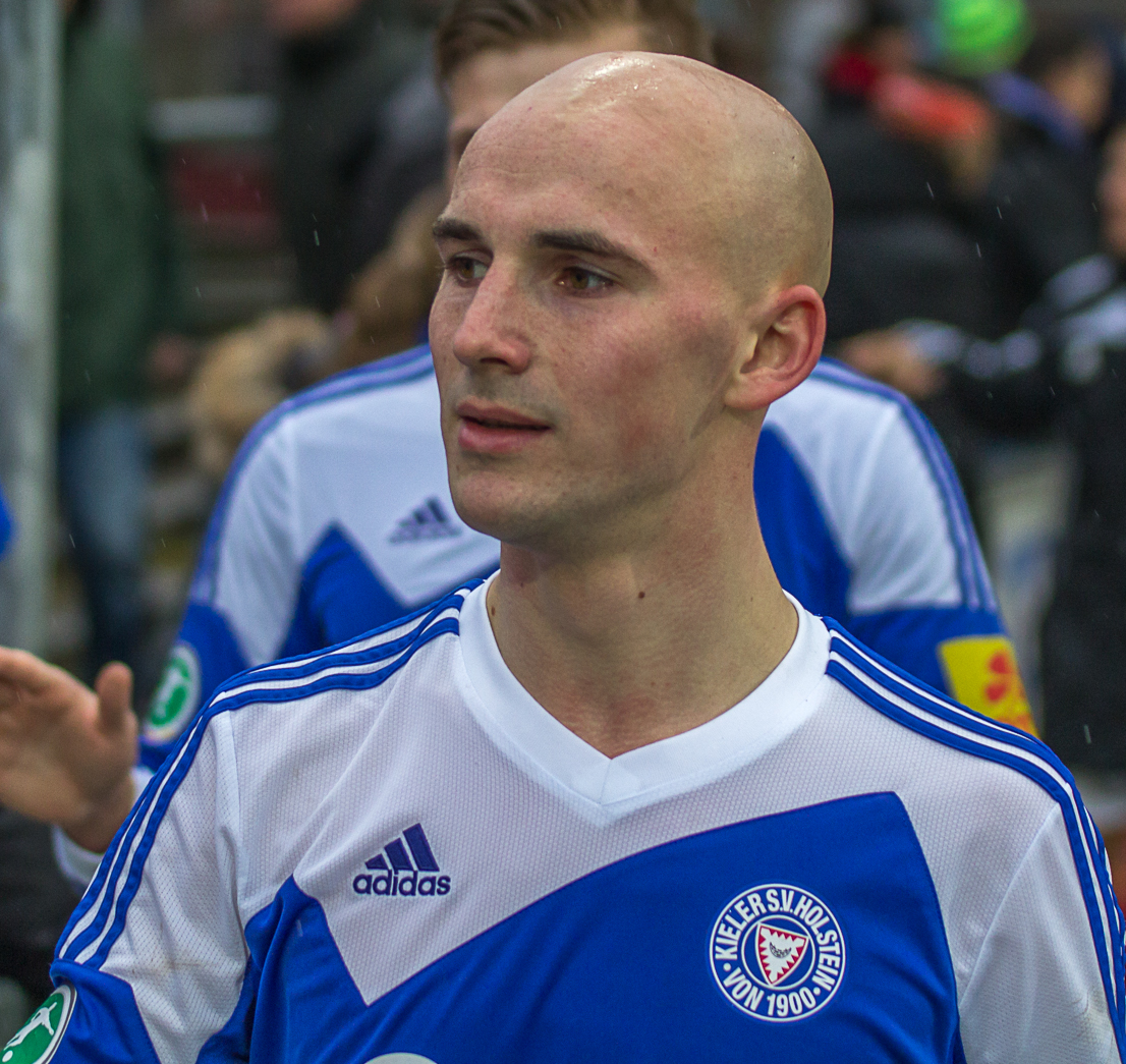 Patrick Herrmann